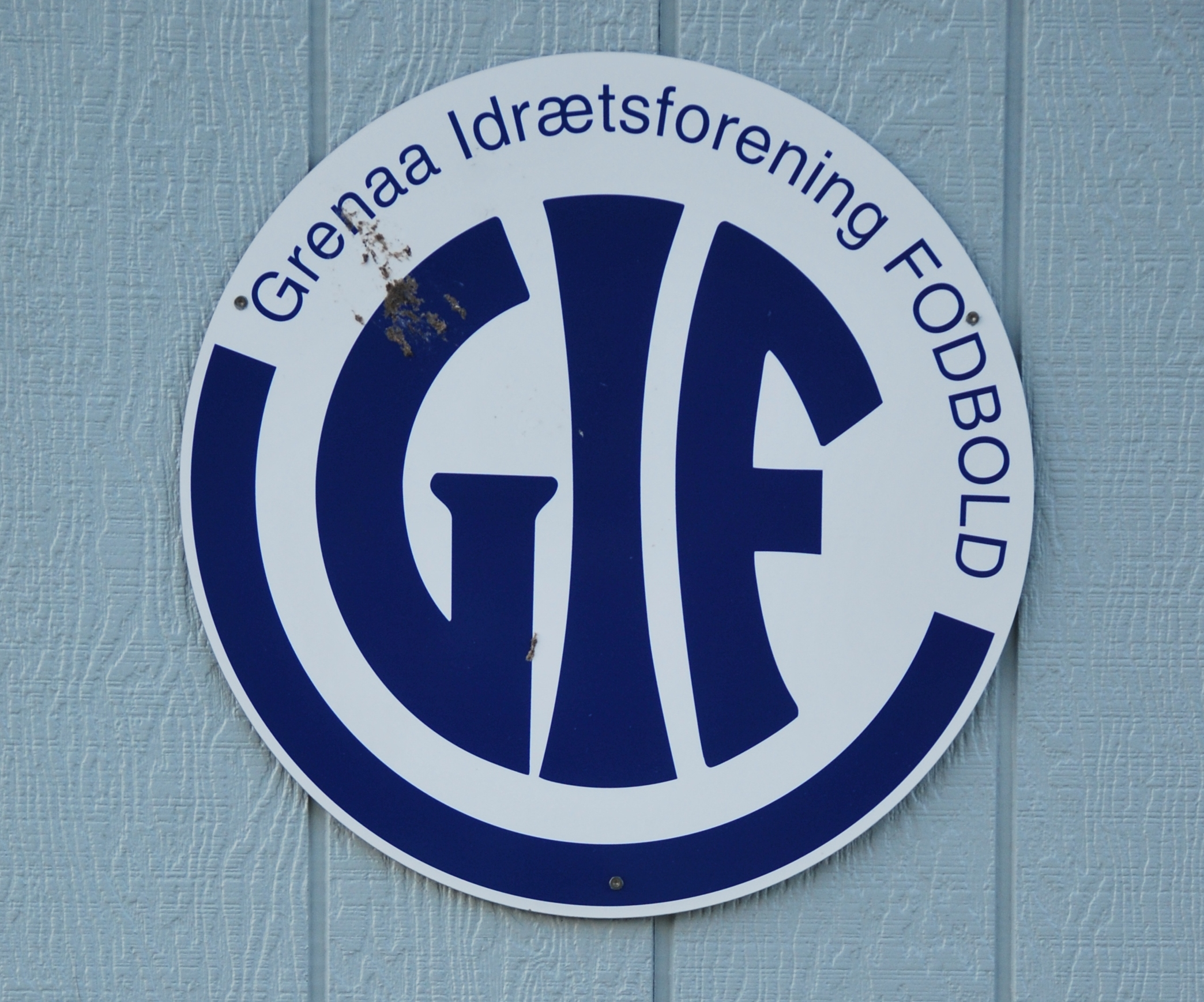 Skilt med Grenaa Idrætsforenings logo.